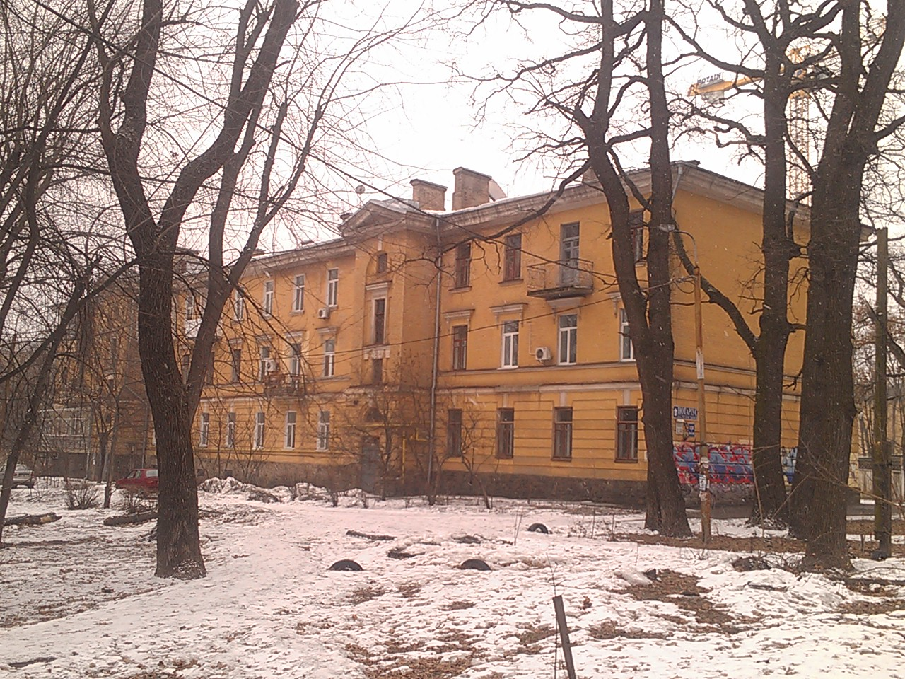 КВВАИУ, Киев, Украина. Жилой корпус 4.